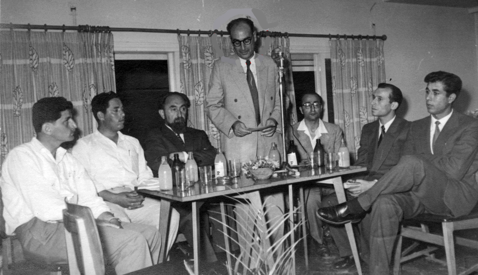 1954 - מפגש סופרים ומשוררים ערביים במועדון מילוא